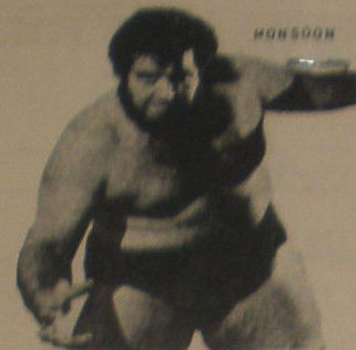 Chief Jay Strongbow dans un programme de catch Heavyweight Wrestling du 31 août 1970